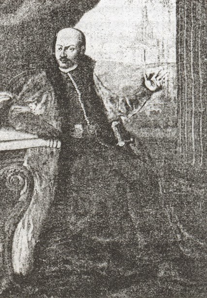 Беларуская (тарашкевіца): Партрэт Язэпа Корсака (Jazep Korsak)